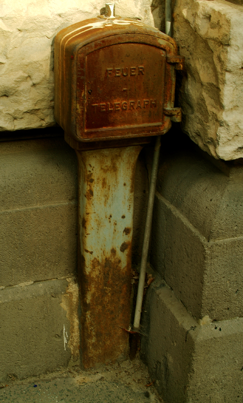 Fristet nur noch ein Nischendasein: "Feuer - Telegraph" in der Ecke links neben dem Eingangsportal der ehemaligen Alters- und Invaliditäts-Versicherungsanstalt in Hannover, Maschstraße 25